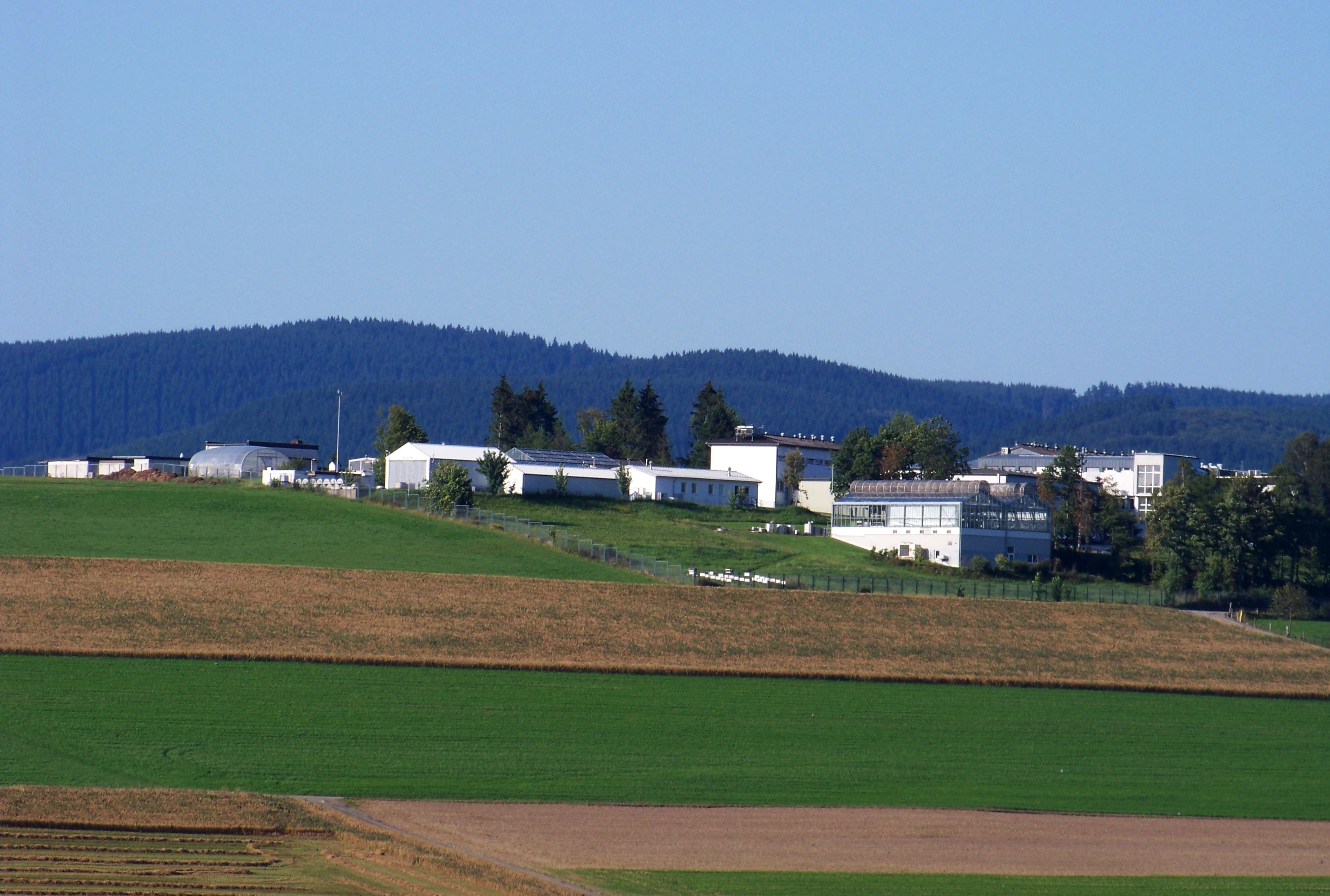 Fraunhofer Institut in Schmallenberg, Germany.